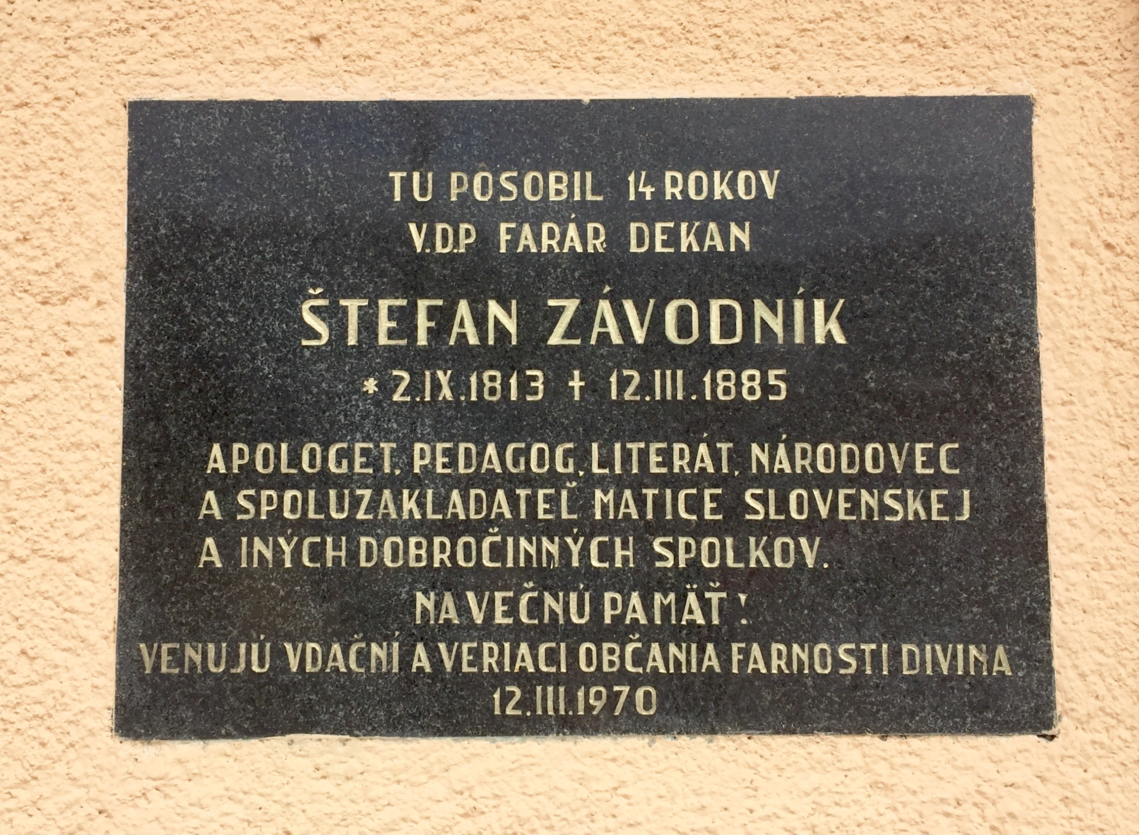 Pamätná tabuľa na budove fary v Divine venovaná Štefanovi Závodníkovi